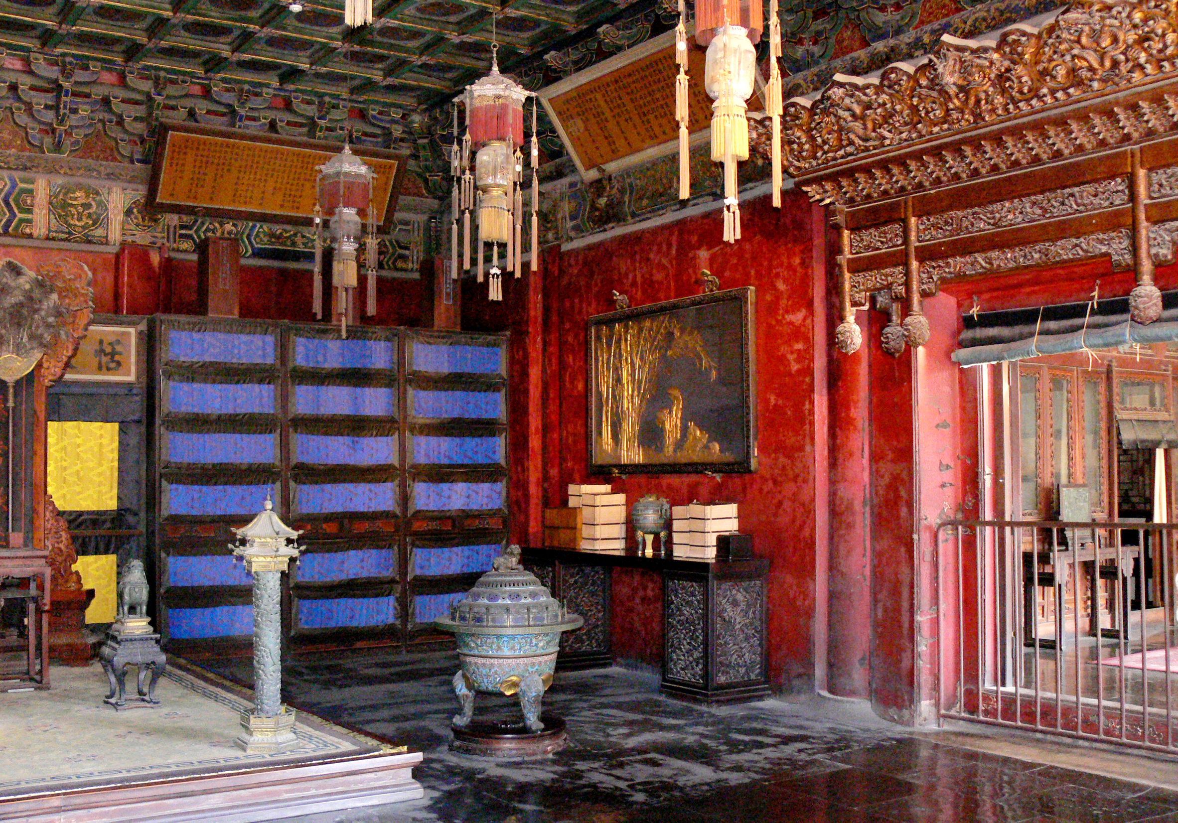 养心殿东暖阁